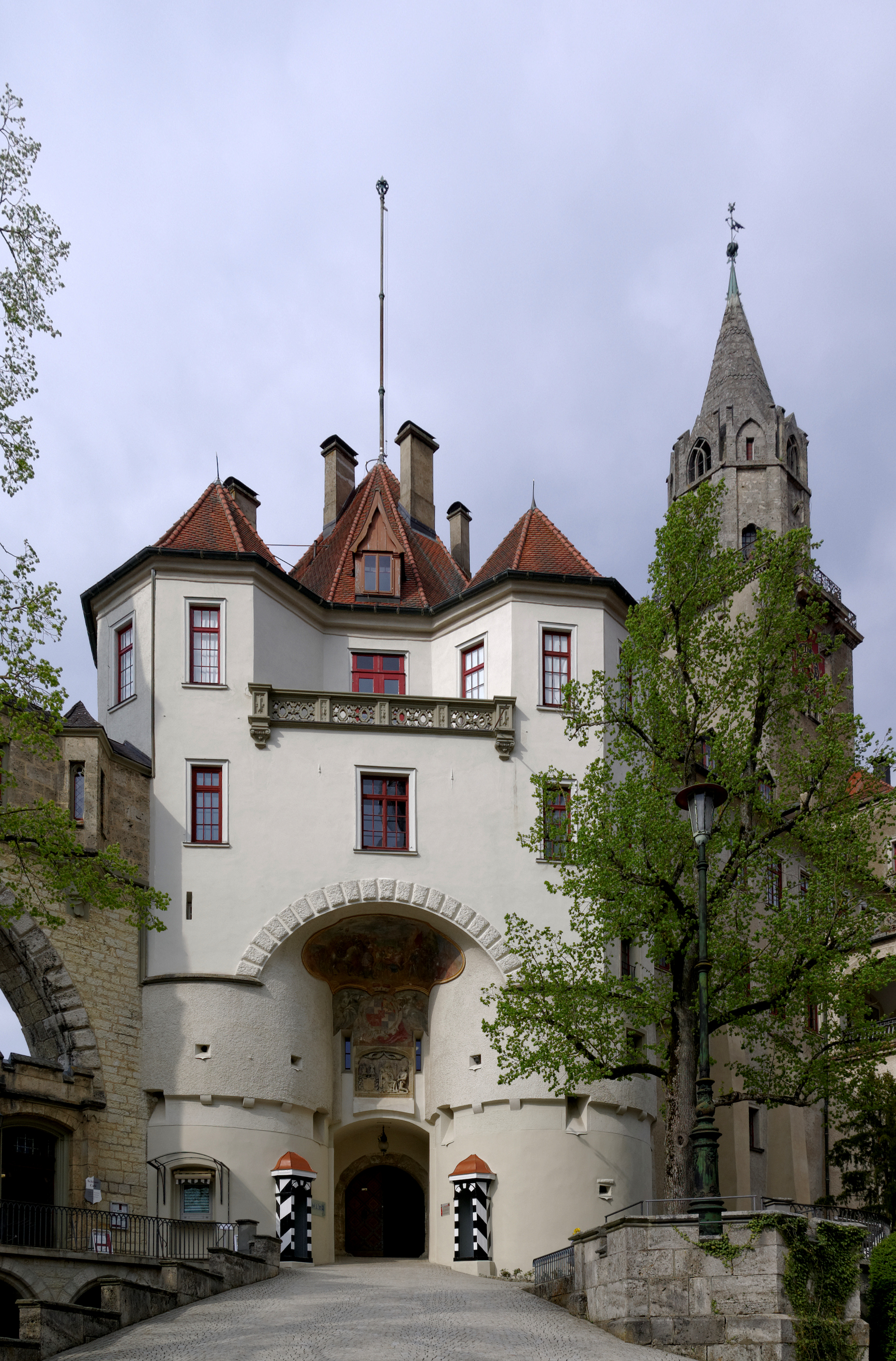 Sigmaringen Schloss, Eingang